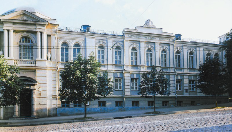 Будівля Національного музею літератури України: Вигляд Національного музею літератури України з вул. Б.Хмельницького